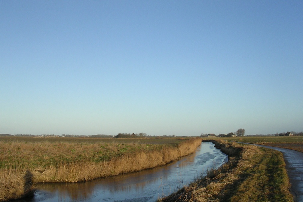 De Paezens by Easternijtsjerk (river Paezens at the village of Oosternijkerk)